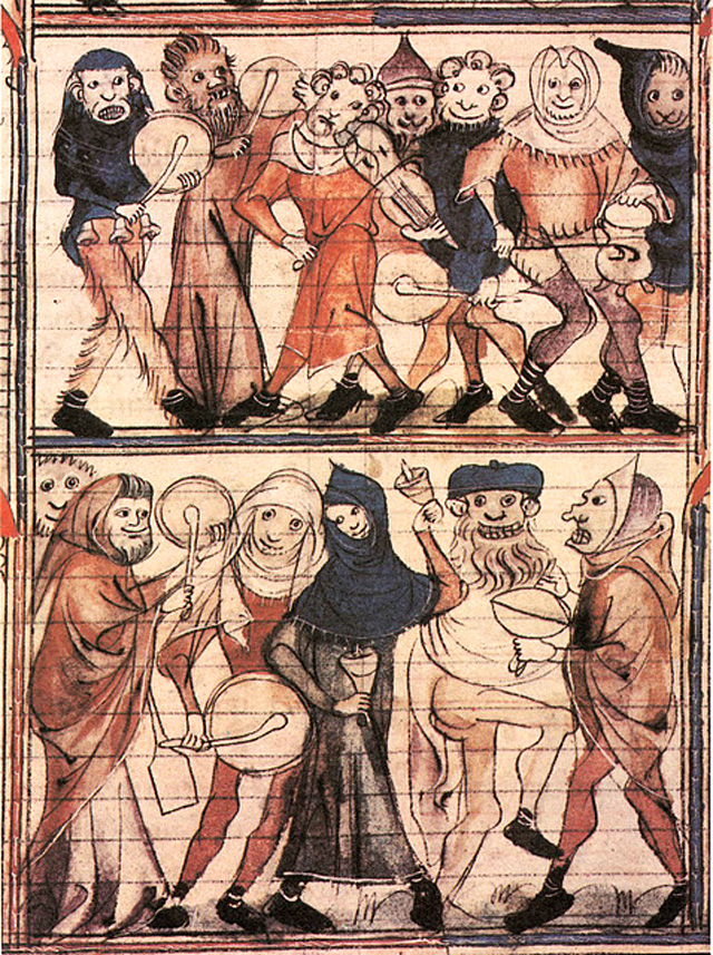 Miniature du XIVe siècle représentant une scène de charivari